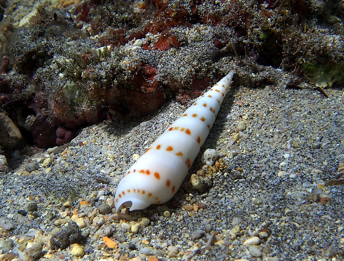 Le gastéropode Oxymeris felina à la Réunion.